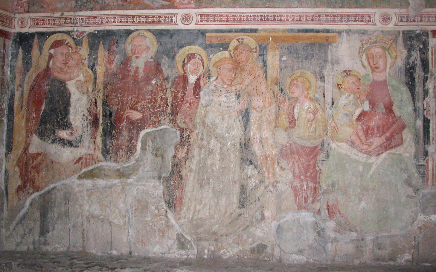 Deposizione; affresco attribuito al cosiddetto "Maestro della Deposizione" e datato al XV secolo. Chiesa di San Giorgio in Lemine (ad Almenno San Salvatore, Bergamo). Fotografia di Giorces.